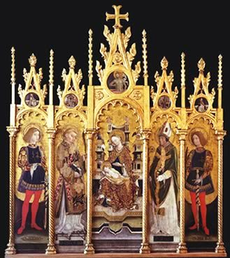 Polittico di Paolo da Caylina nell'Abbazia di Sant'Albino